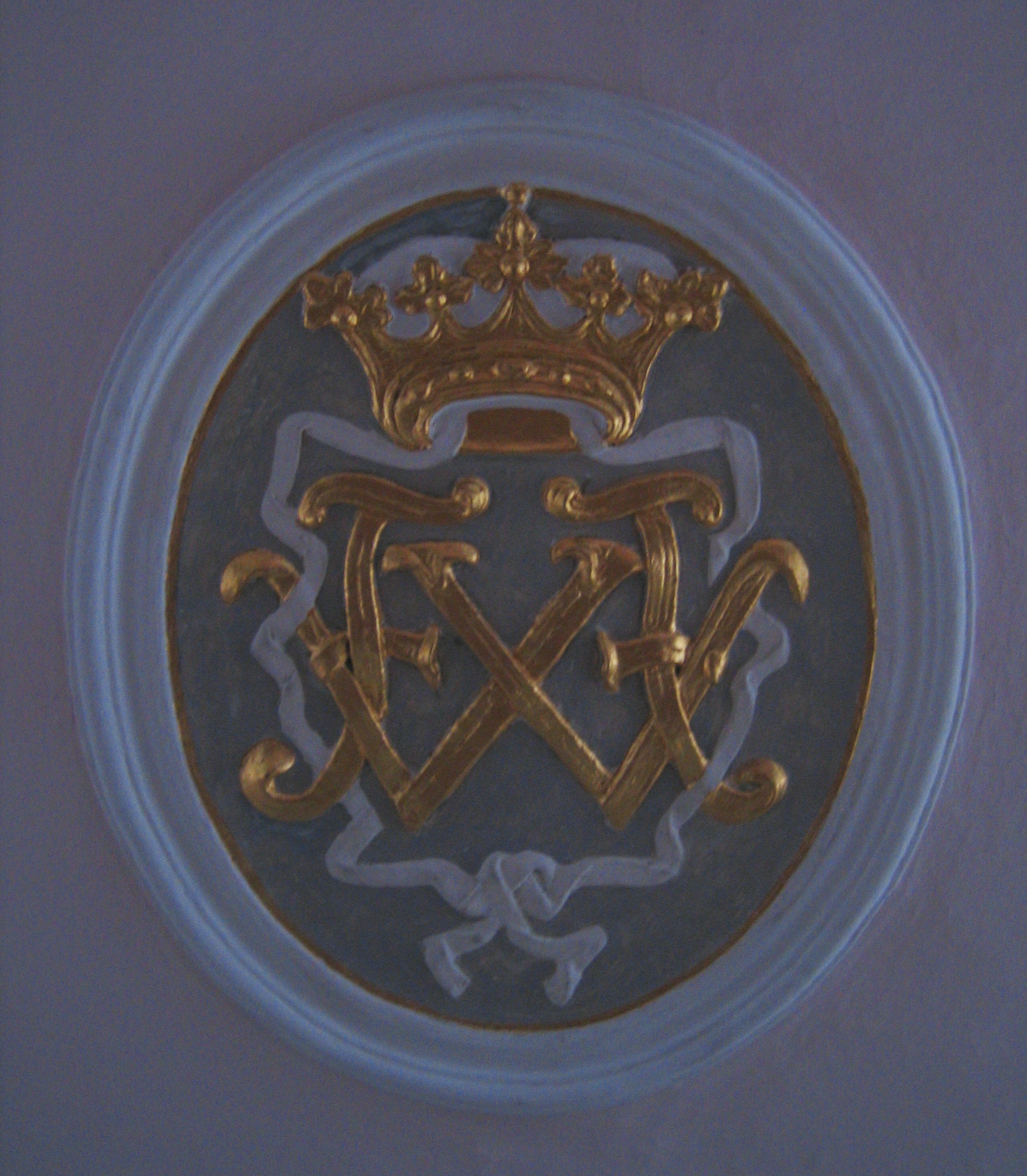 Stuckiertes Monogramm von Friedrich Wilhelm Graf zu Solms-Braunfels unter der Orgel in der Evangelisch-reformierten Kirche in Wölfersheim. Mit freundlicher Genehmigung der Kirchengemeinde.